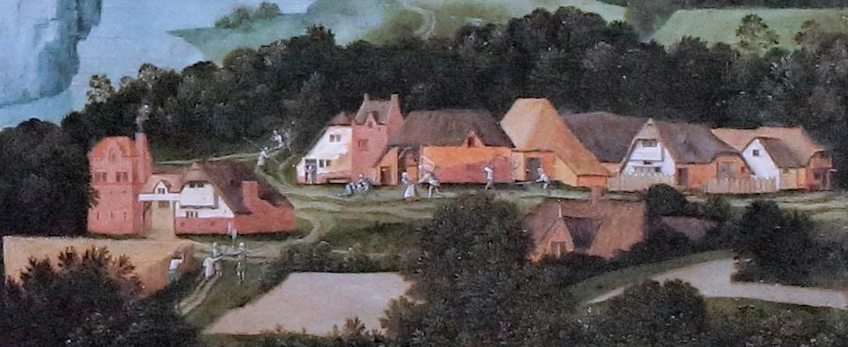 Joachim Patinier (1480-1524), Repos pendant la fuite en Egypte, detail 2.